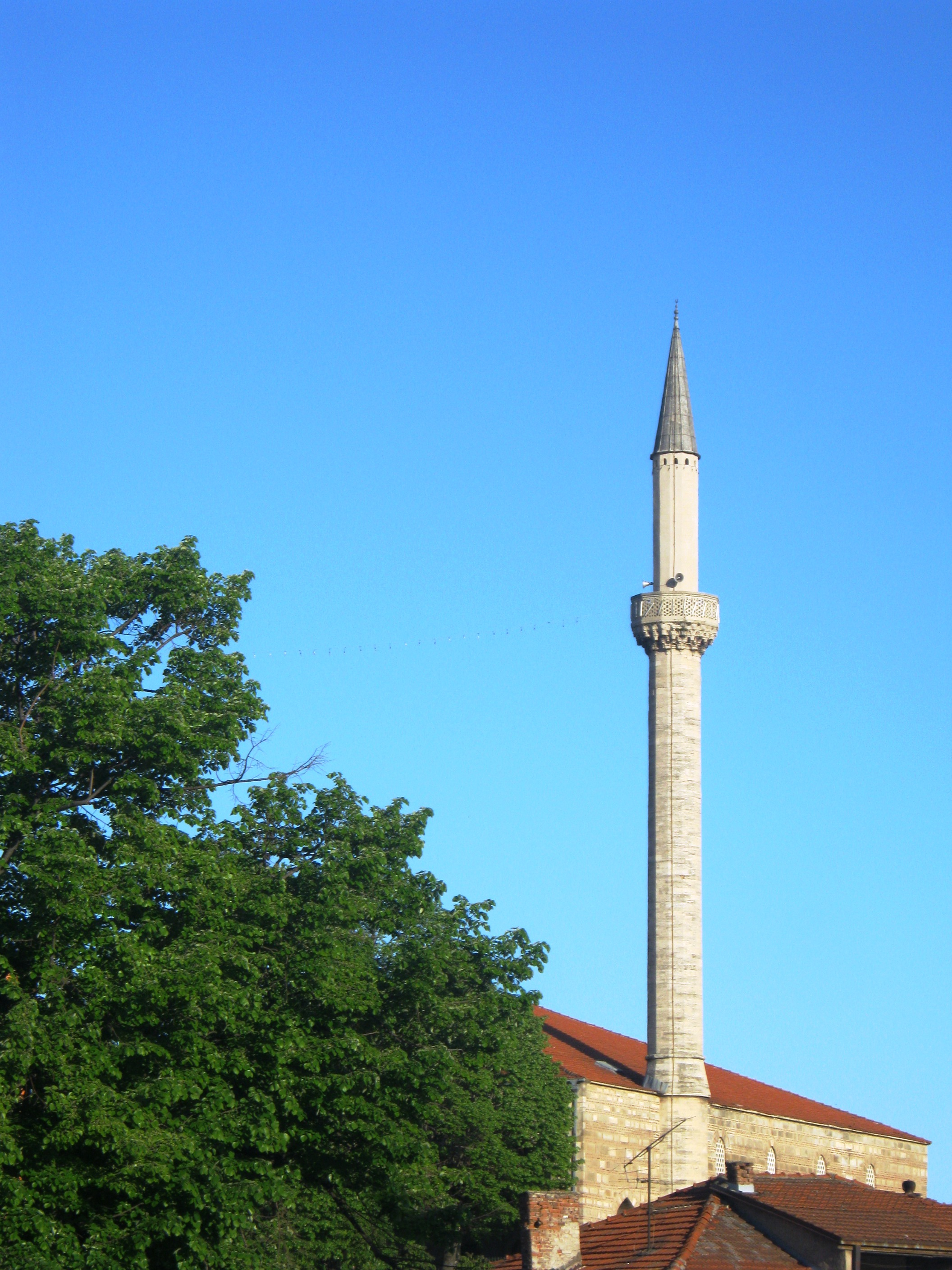 Султан-муратова џамија во Скопје